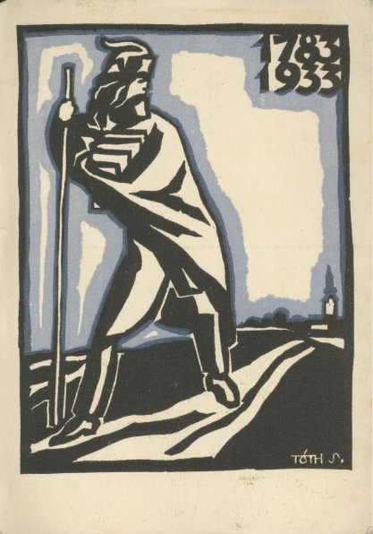 Memento of the Pápa Reformed College's exile to Adásztevel (1753-1783), published in 1933, on the 150th anniversary of the return. Emléklap a Pápai Református Kollégium adászteveli száműzetése (1753-1783) emlékére, megjelent 1933-ban, a visszatérés 150. évfordulóján.